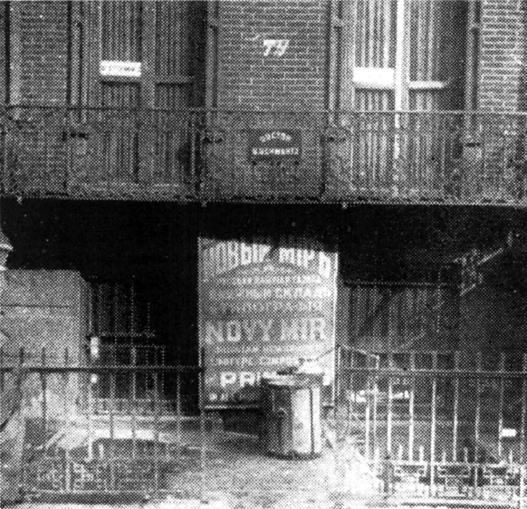 «Новый Мир» — газета русских социал-демократов, живших в эмиграции в Нью-Йорке. Выходила в 1916—1917 годах.